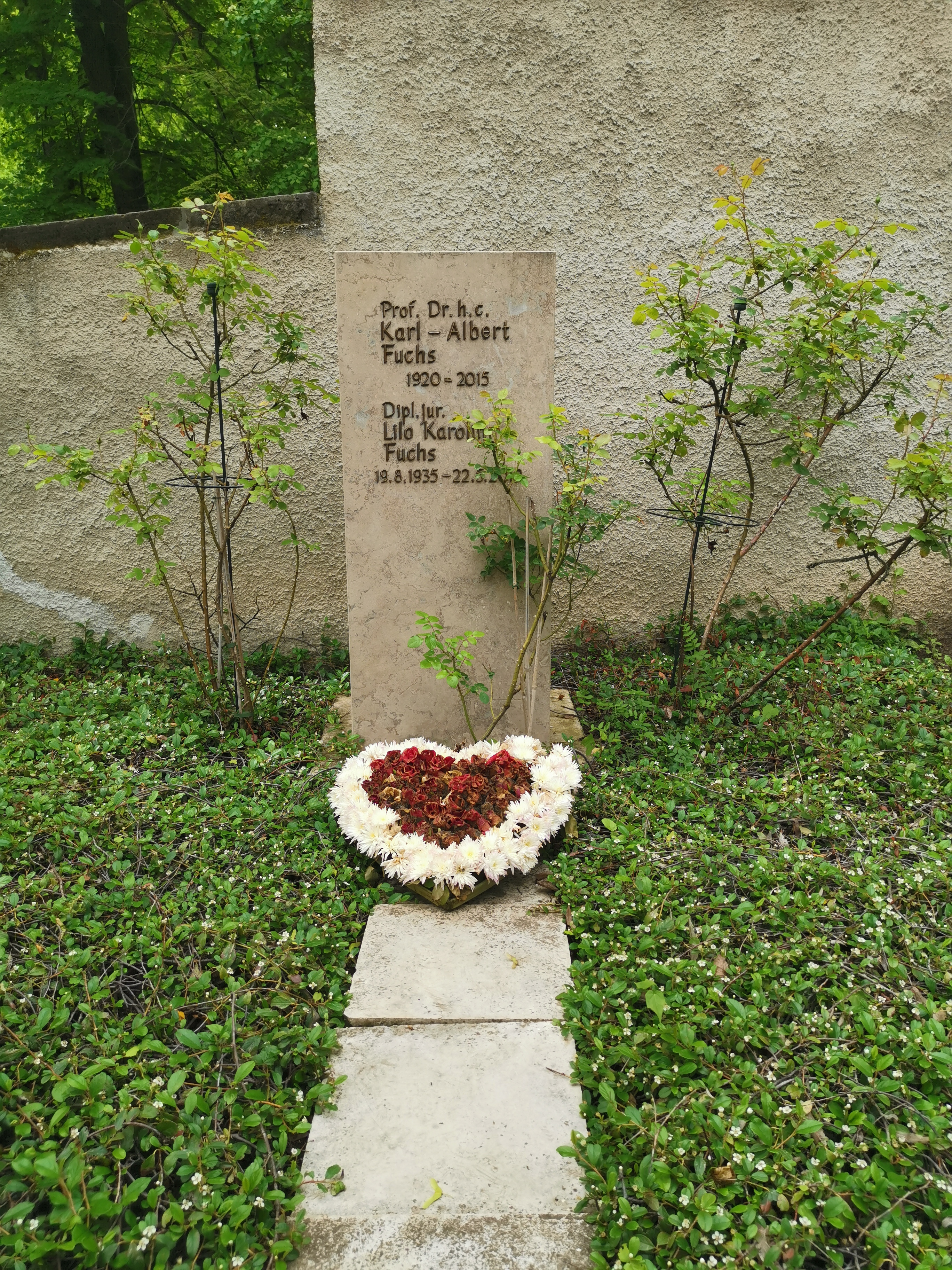 Historischer Friedhof Weimar